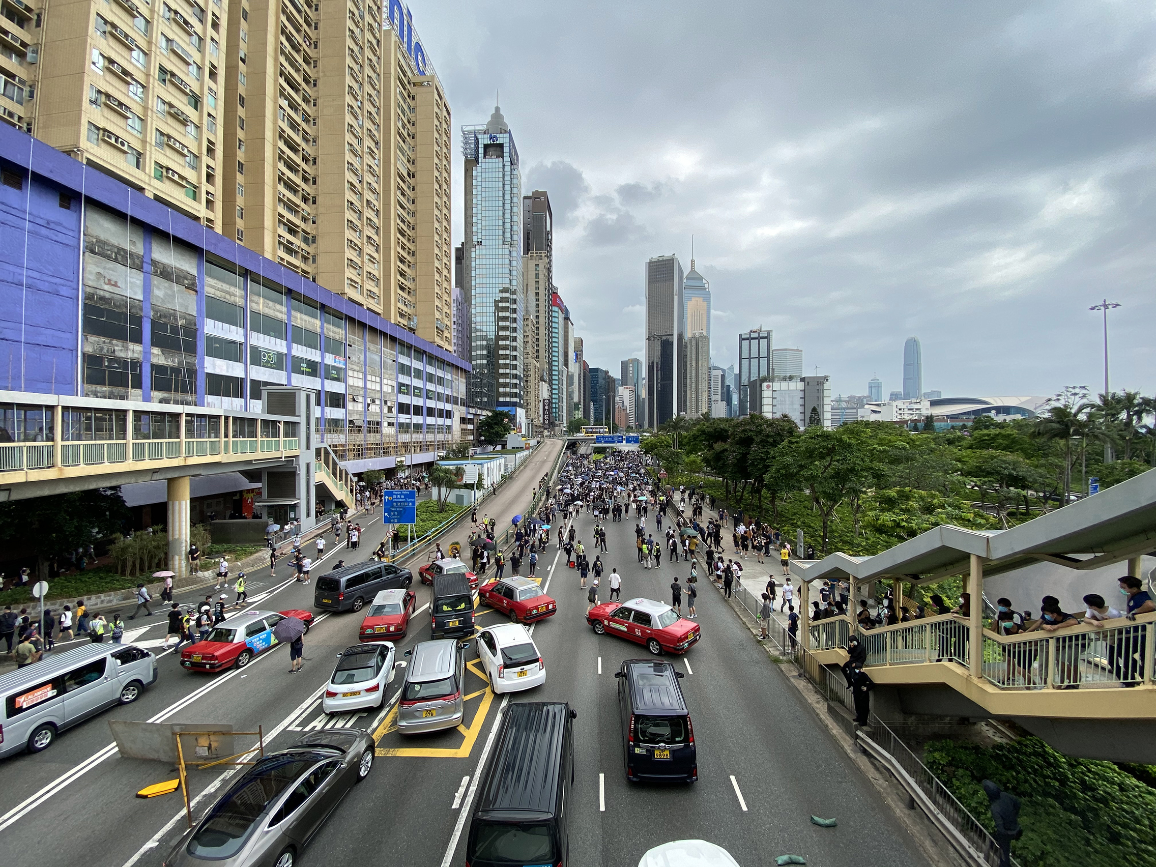 Gloucester Road CWB Roadblock